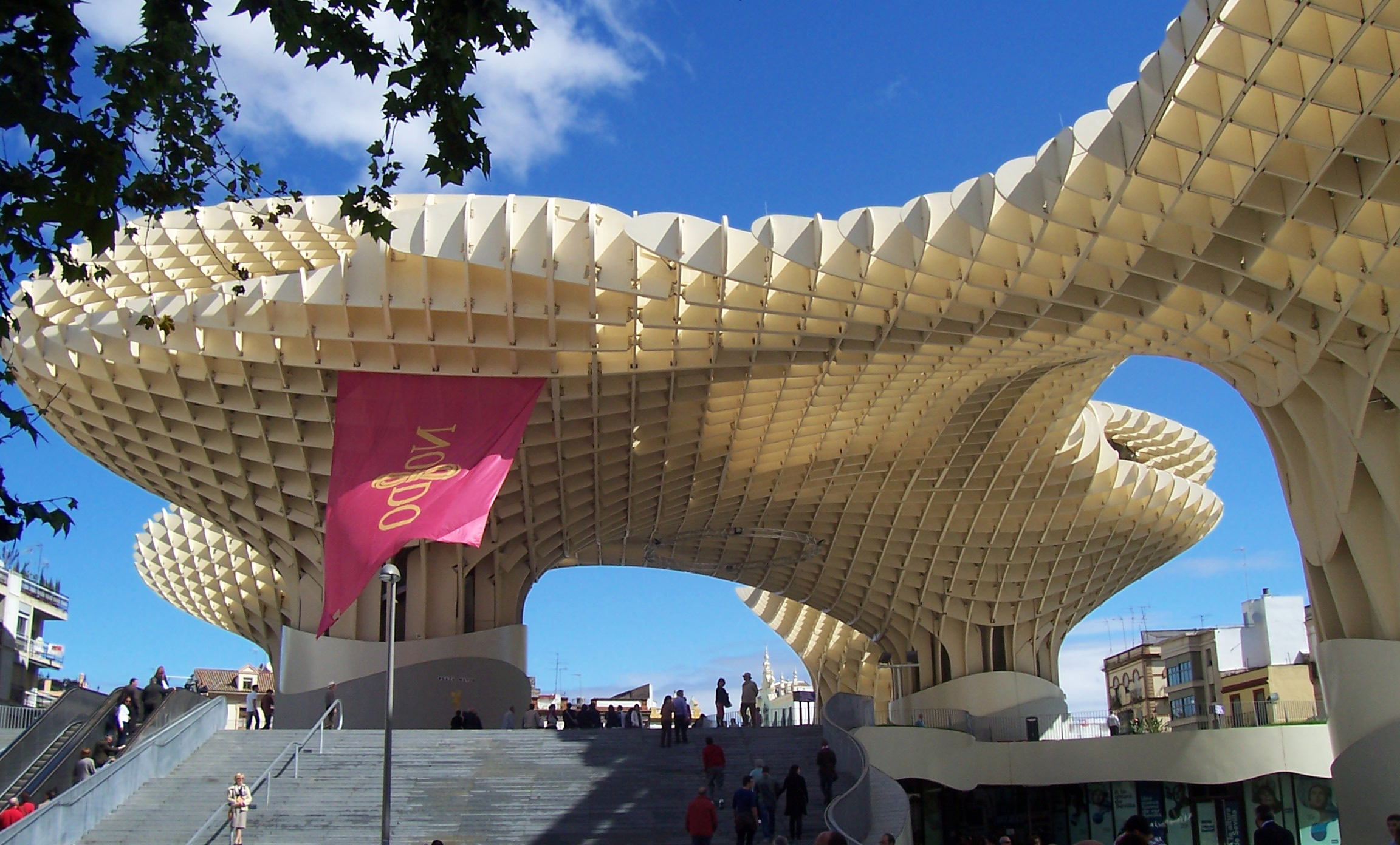 Metropol Parasol - Sevilla